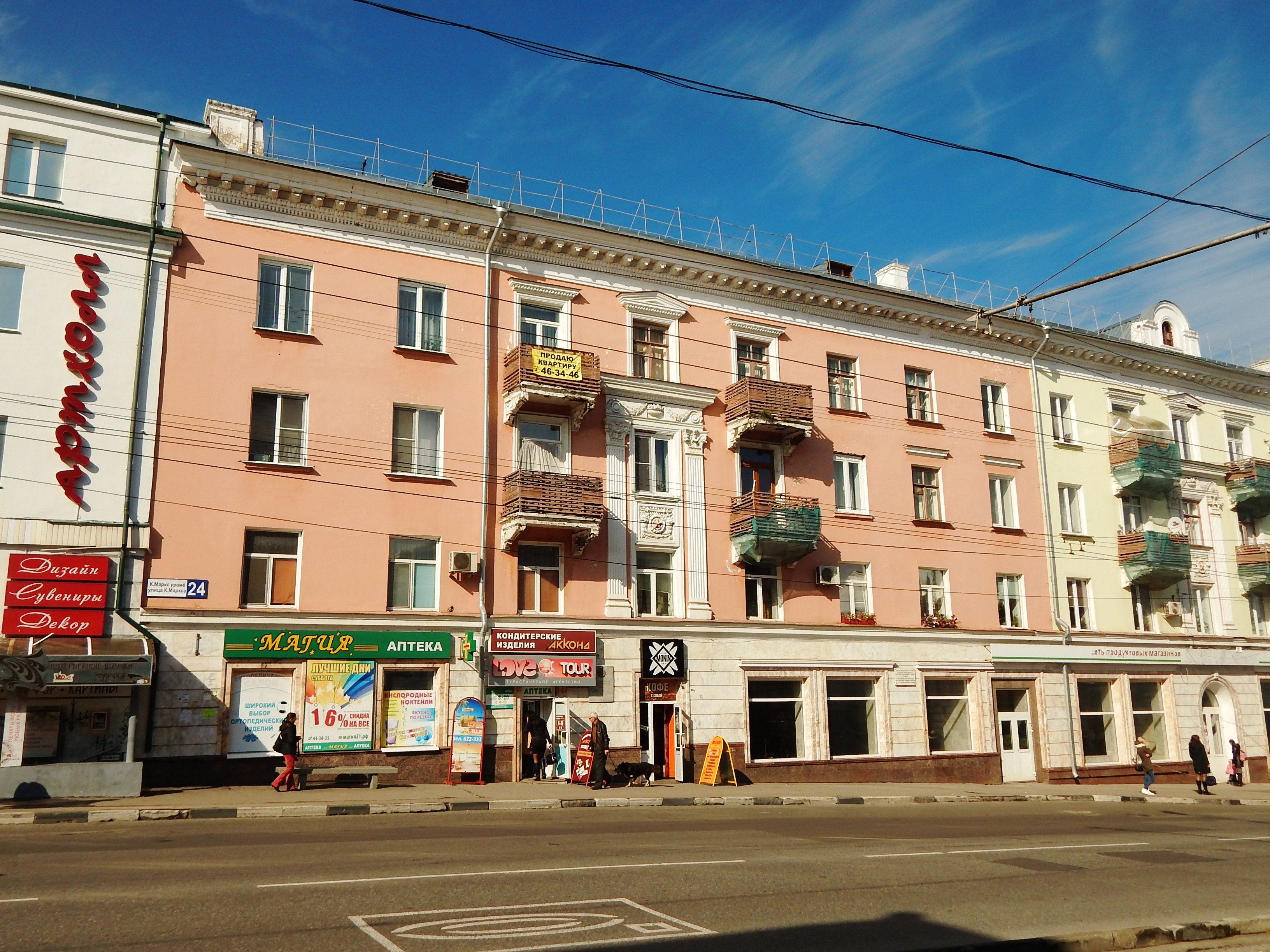 Квартира, в котором в последние годы жил и работал народный поэт Чувашии С.В. Эльгер: улица Карла Маркса, 24, Чебоксары, Чувашия